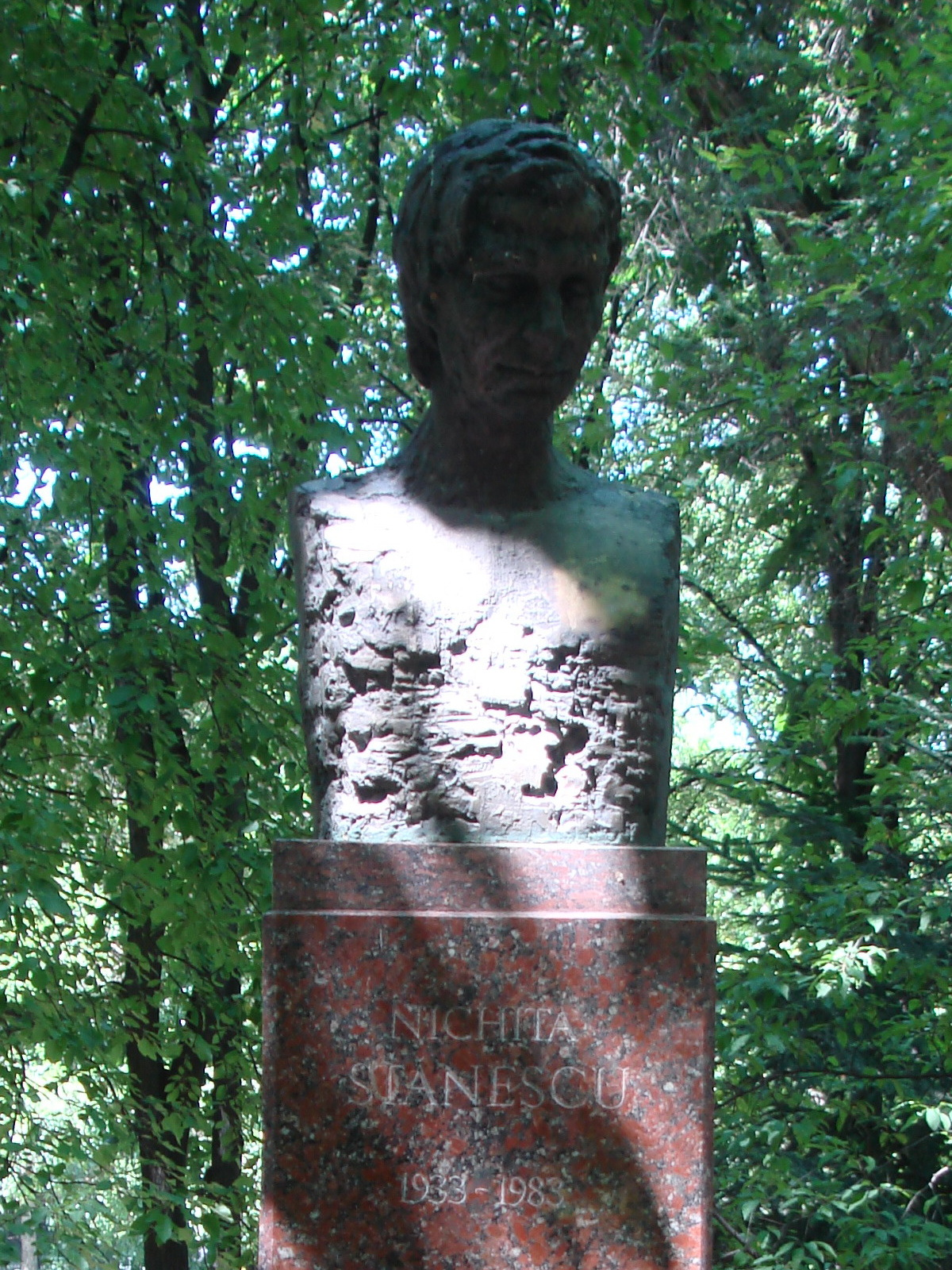 Бюст Никиты Стэнеску в Аллее Классиков